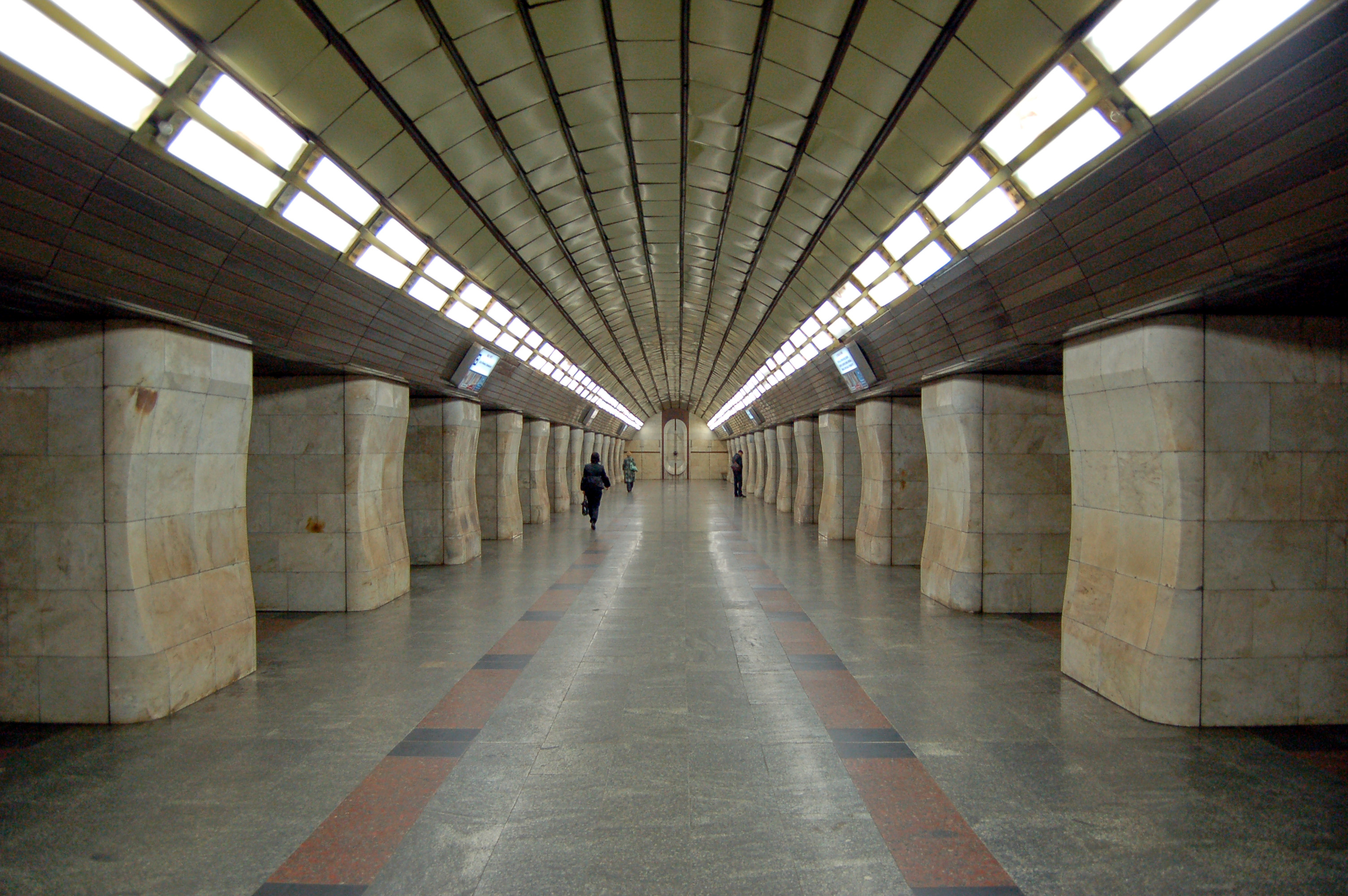 Станция метро «Кловская»